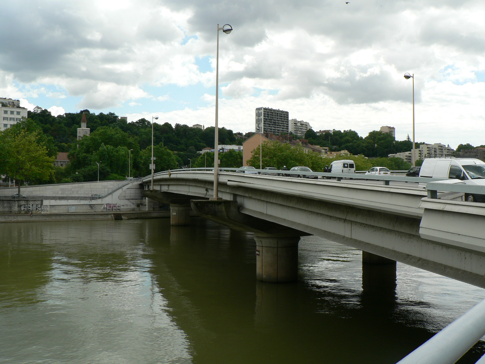 Ponts de Lyon - Pont Clémenceau